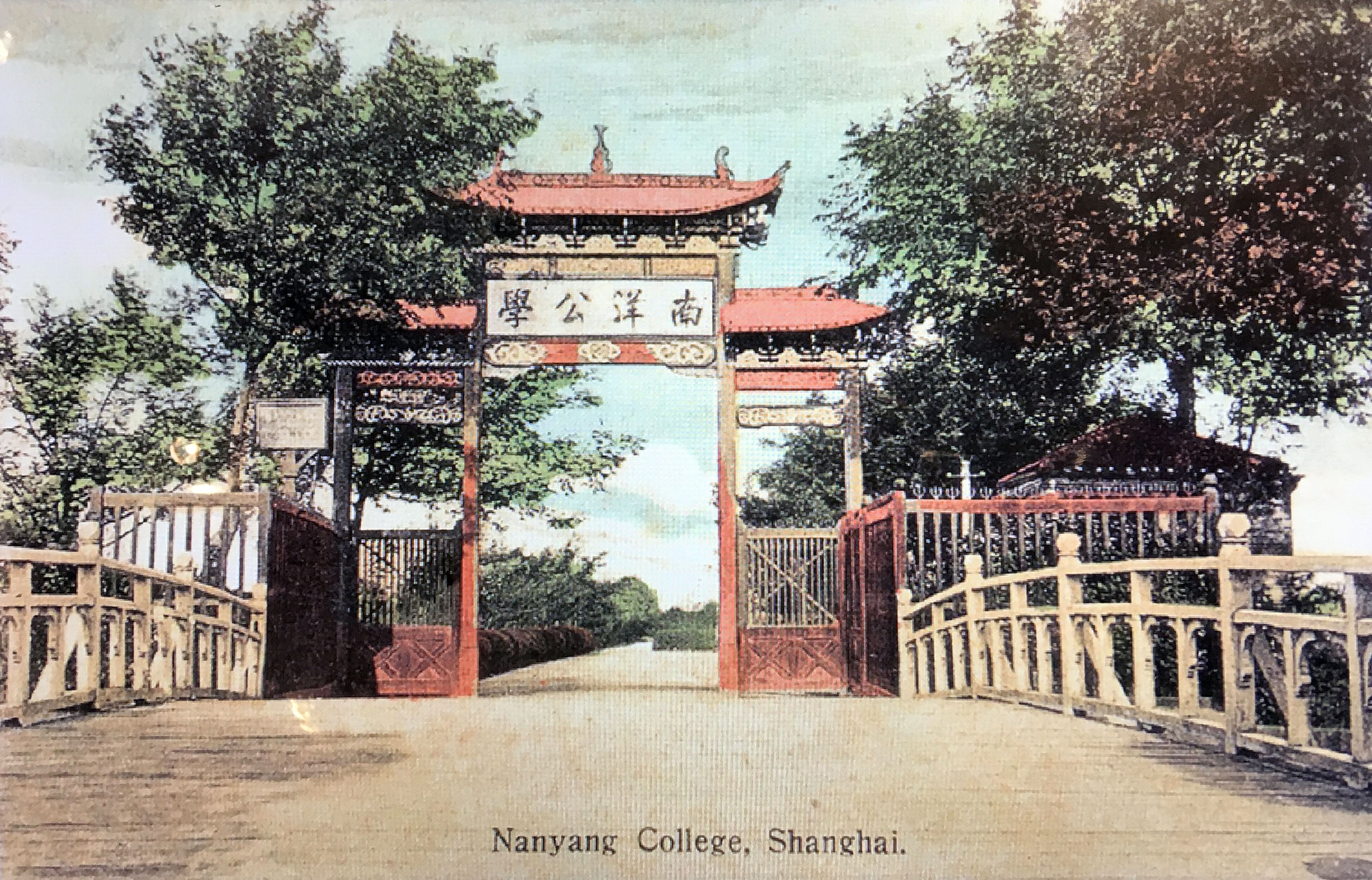 中文（中国大陆）: 南洋公学大门。翻摄自上海交通大学图书馆。